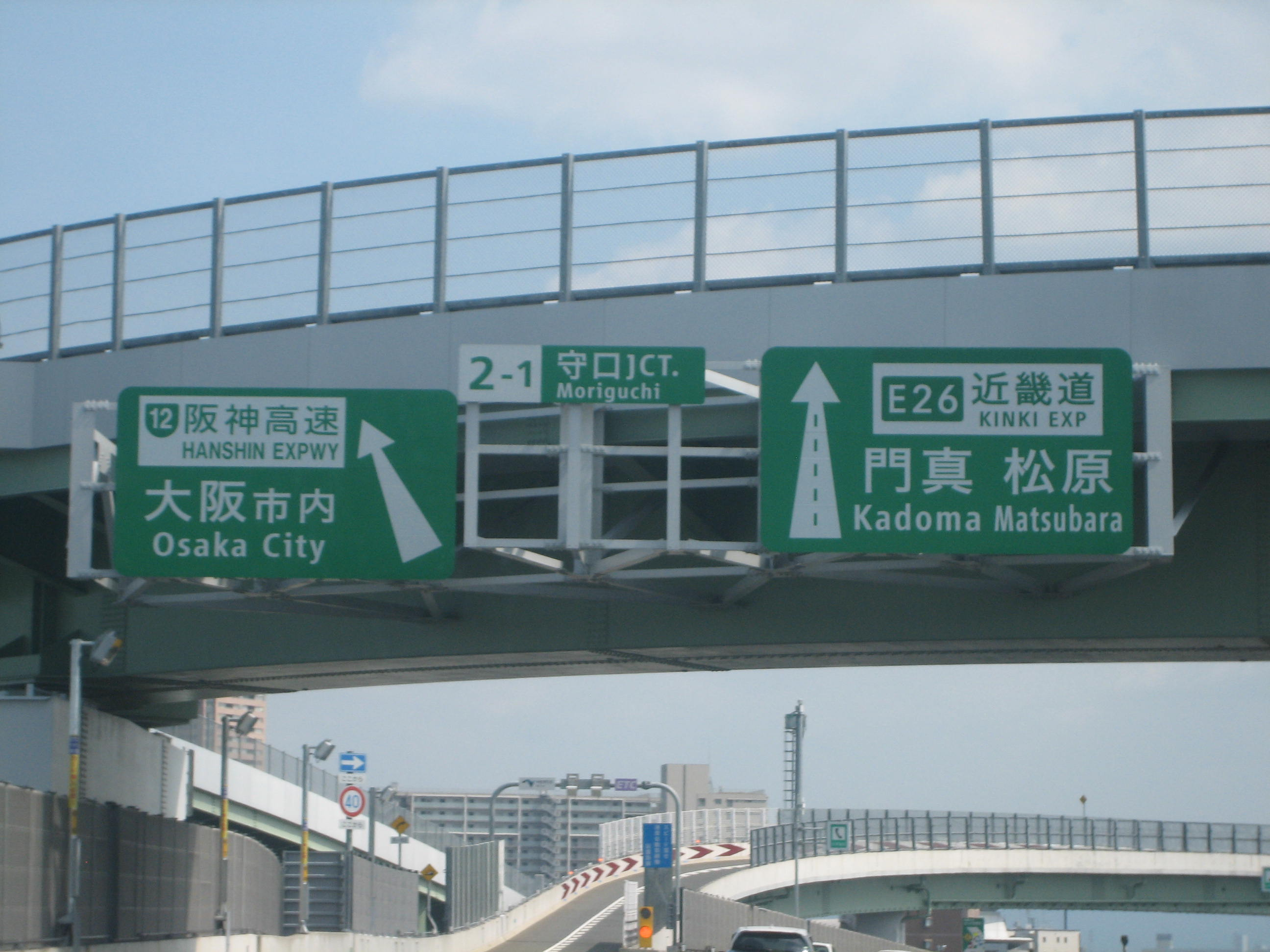 守口JCT